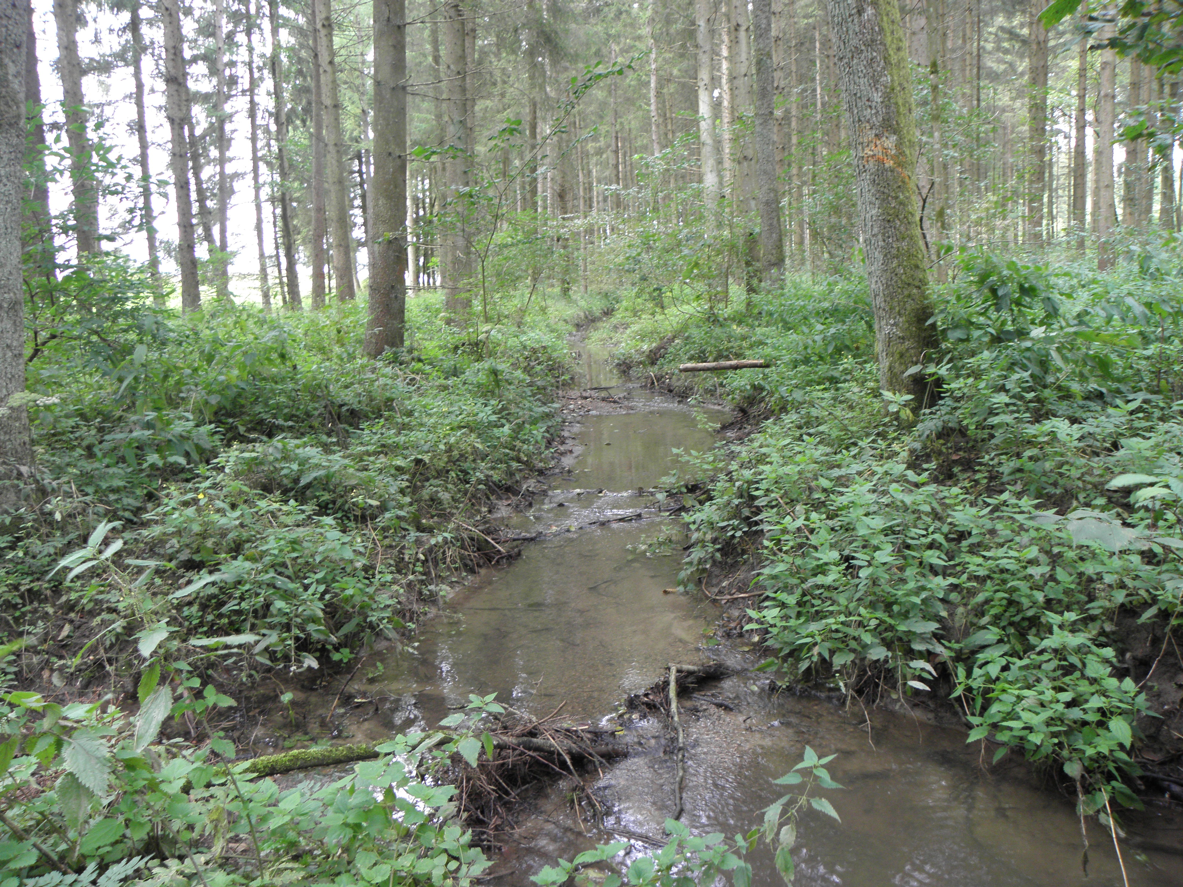 Der Talbach rund 80 Meter oberhalb seiner Bachschwinde (Aufnahme bachaufwärts). Am unteren Bildrand von links (orographisch rechts) der Kaibach als erster größere Nebenbach.